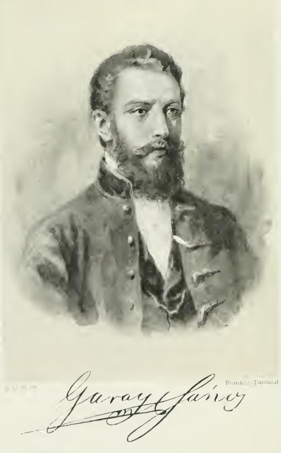 Garay János magyar költő portréja